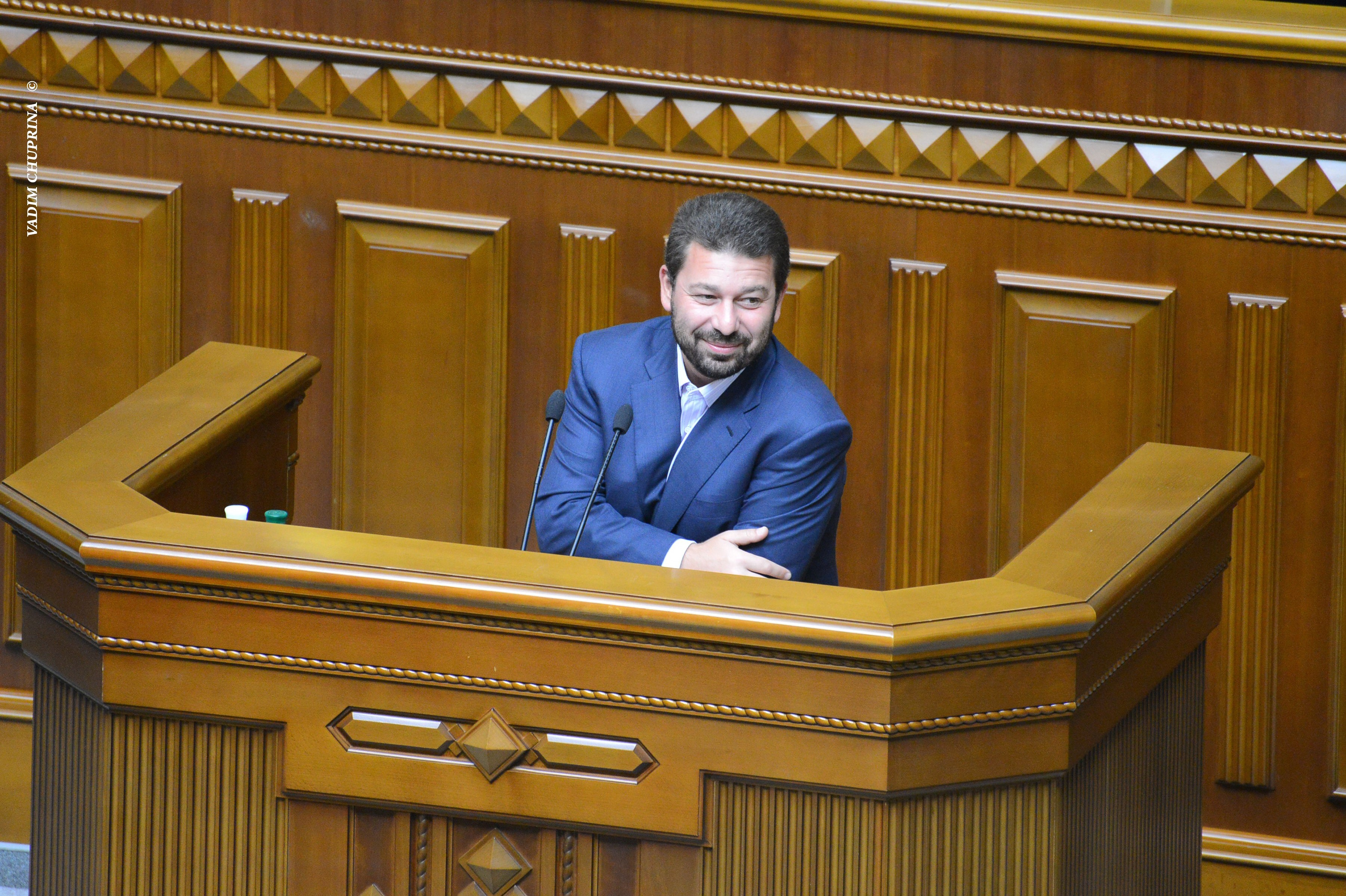 ВЕРХОВНА РАДА УКРАЇНИ 2013 , фото Вадим Чуприна ©